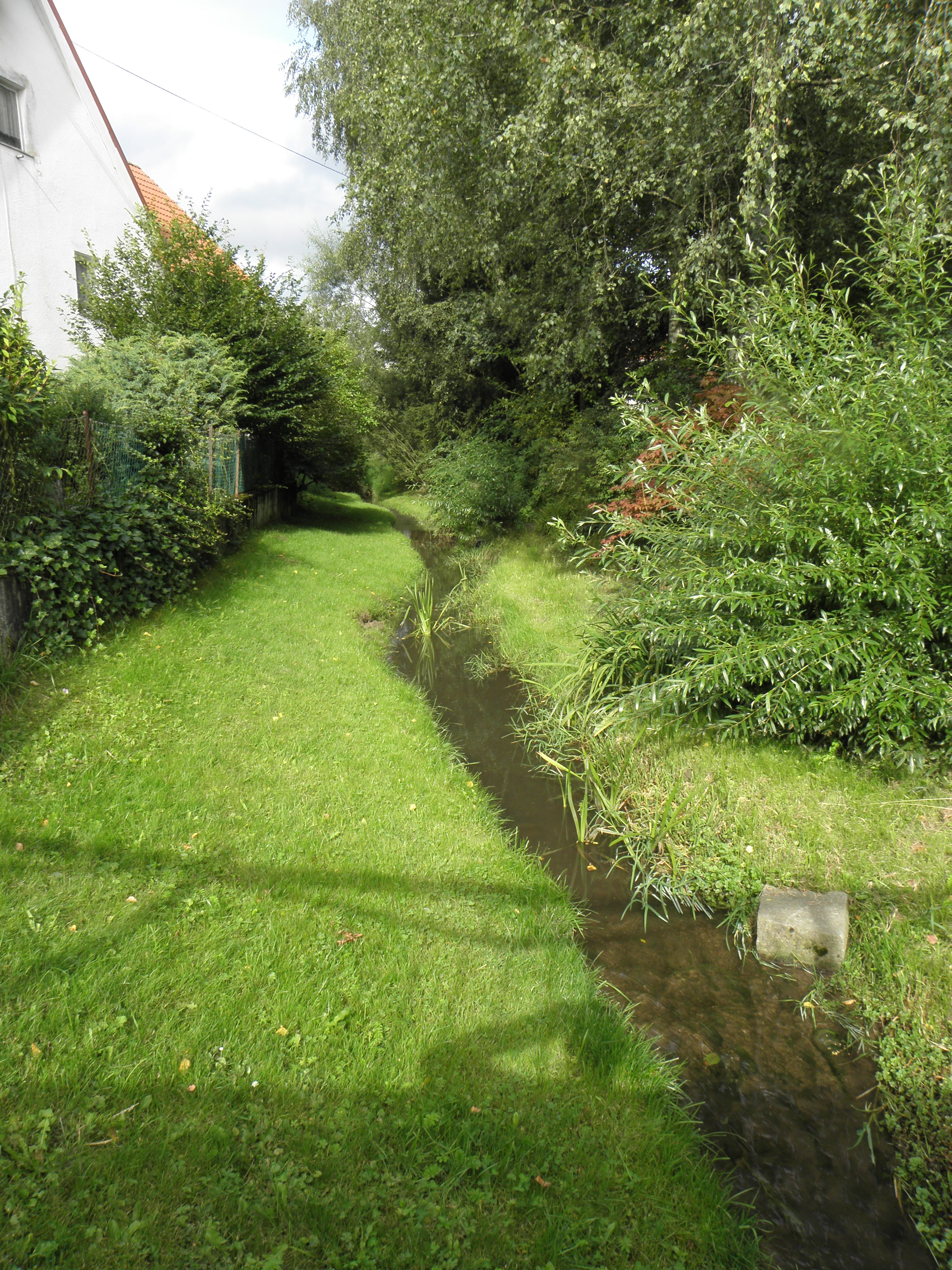 Unterlauf des Talbachs in Menningen kurz vor der Mündung in die Ablach.